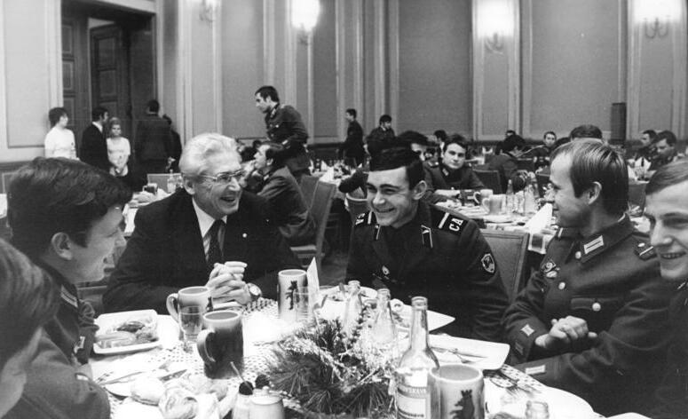 Berlin, Neujahrsfest des Magistrats ADN-ZB Katscherowski 17-12-73 Berlin: Jahresabschlußfeier des Magistrats für verdiente Angehörige der bewaffneten Organe- Oberbürgermeister Herbert Fechner (2.v.l.), empfing am 17.12.73 im Stadtverordnetensaal des Berliner Rathauses verdienstvolle Angehörige der bewaffneten Organe. Zu der schon zur Tradition gewordenen Jahresabschlußfeier wurden auch Mitglieder der SED-Bezirksleitung und eine Abordnung der sowjetischen Streitkräfte herzlich begrüßt. Rechts neben H. Fechner: Grischa Tarassow, rechts von ihm: Wolfgang Dorn. Links von H. Fechner Peter Magerl.